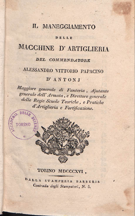 Frontespizio